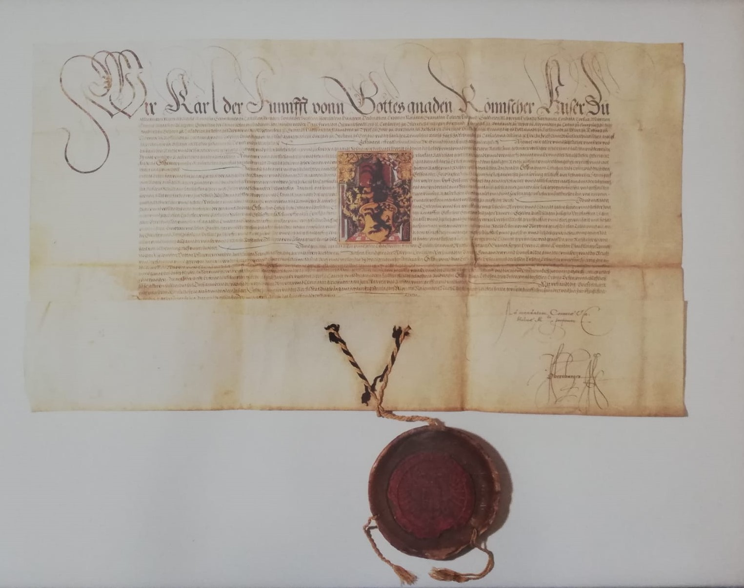 c'est un document écrit avec la police gothique et est écrit pour la majeur partie en allemand et un peu en latin.